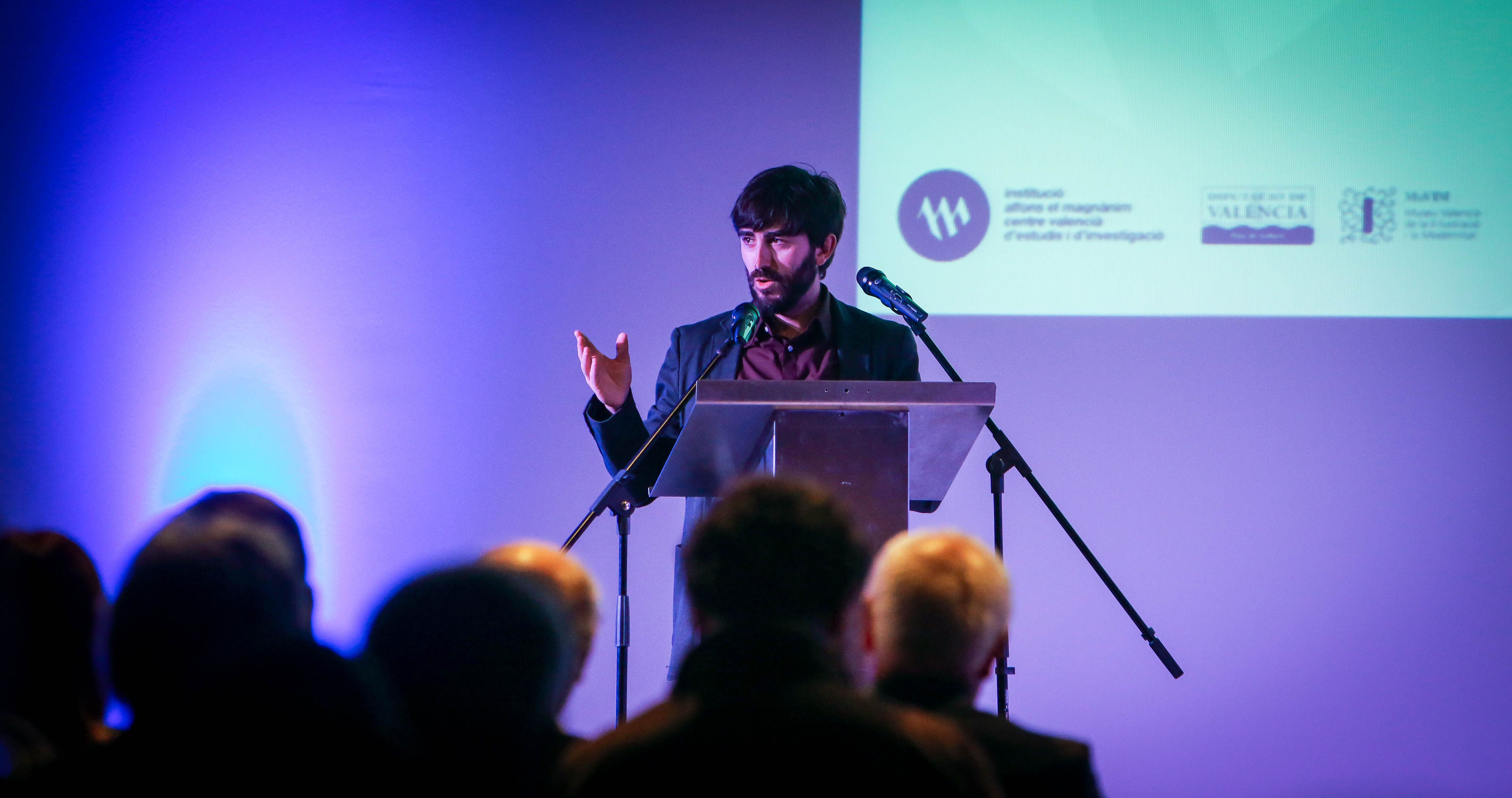 Gala dels premis València 2016